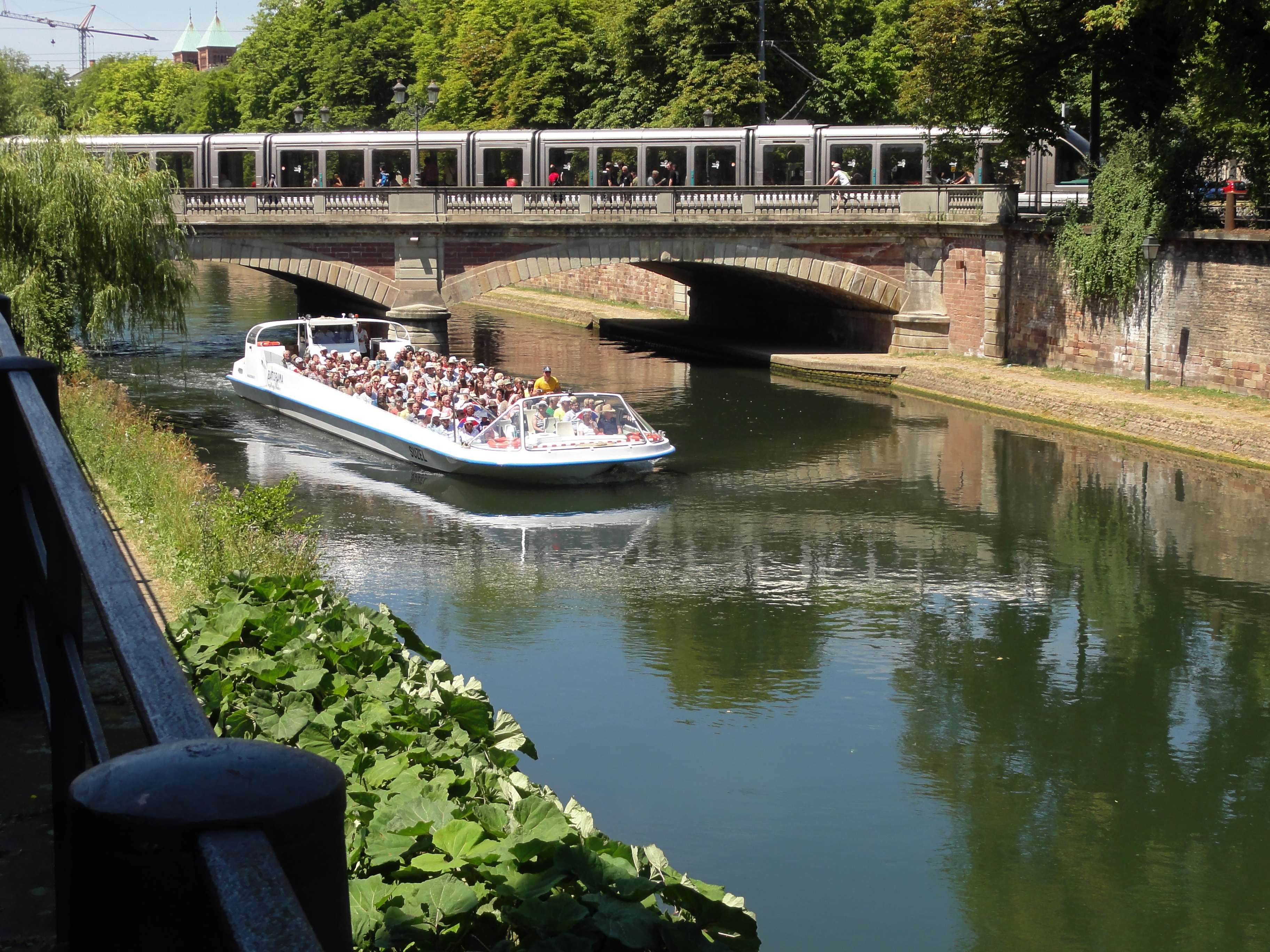 Alsace, Bas-Rhin, Strasbourg, Pont du Théâtre.